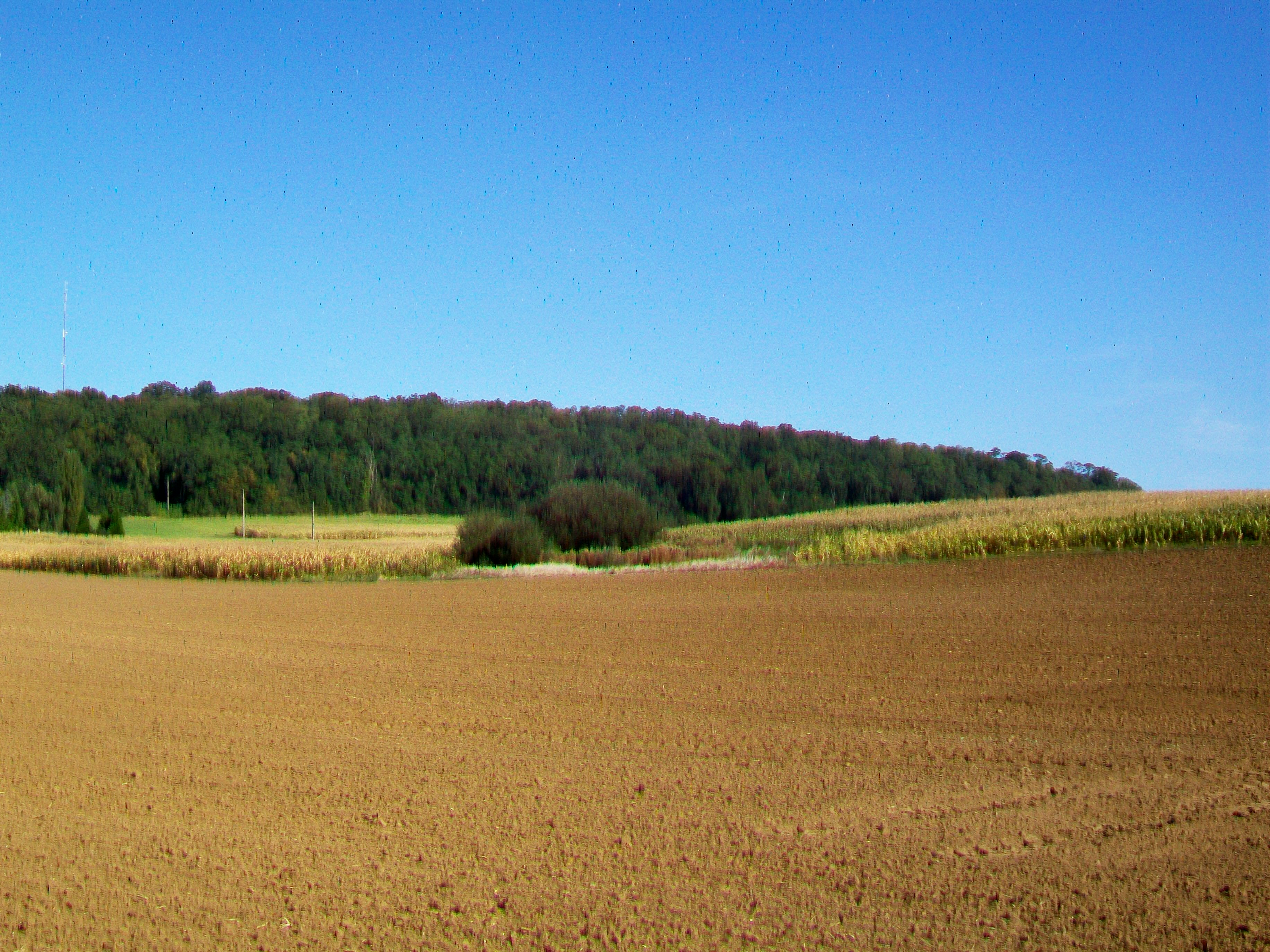 Vue sur le mont d'Huette (154 m) au nord-est du village.